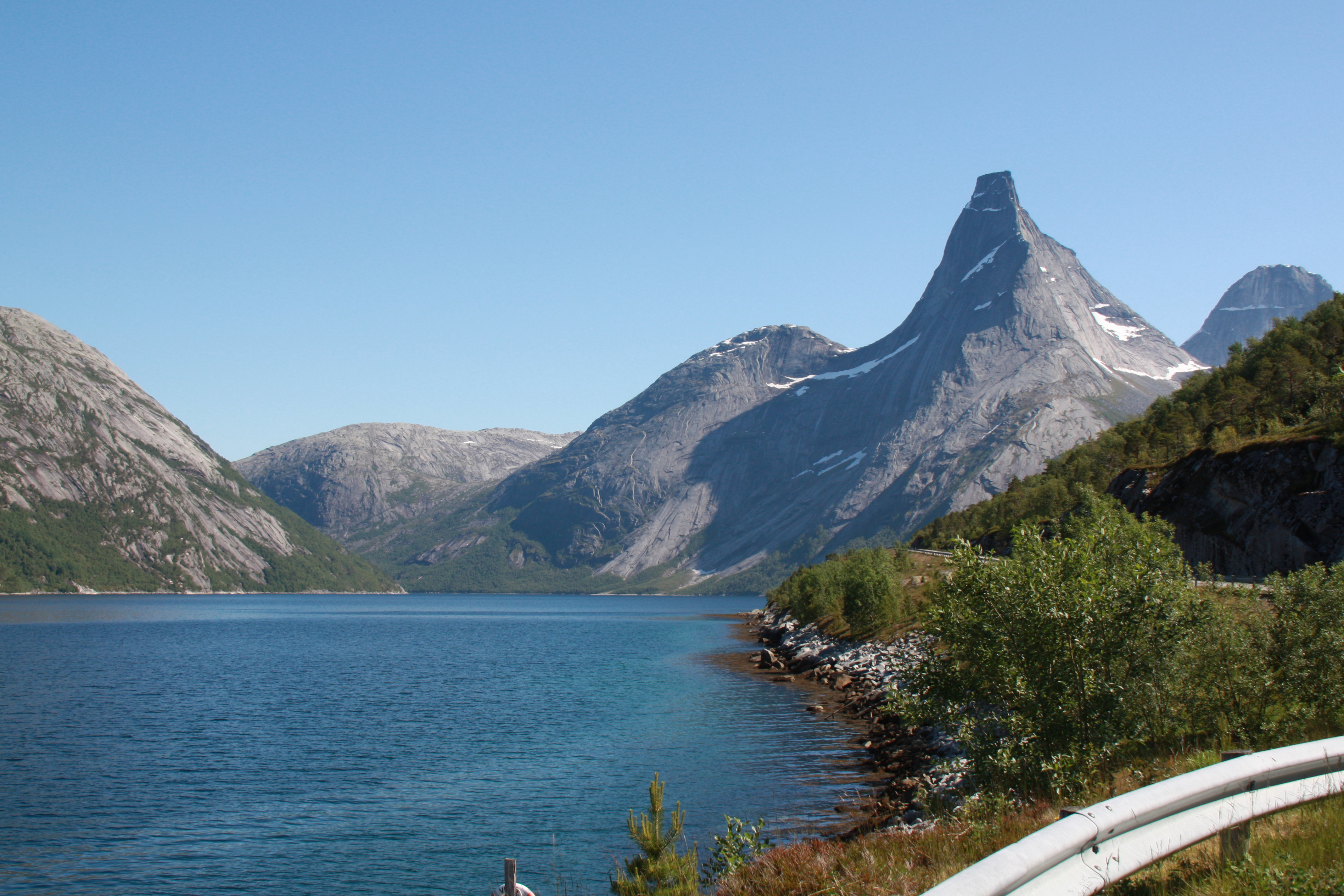 Stetind (mountain 1,392 m /4600 ft and a branch of Tysfjord, Norway)